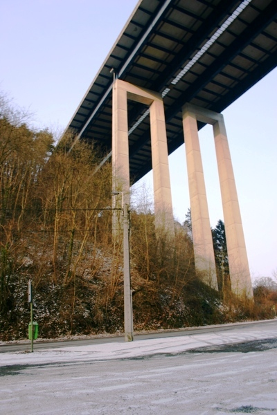 De Viaduc vu Sécheval am August 2005. Kategorie:Brécken an der Belsch